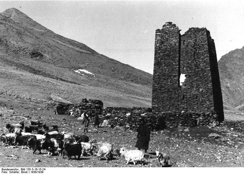 Rimbungtal (Rangtal), Schafe und alter Wachturm